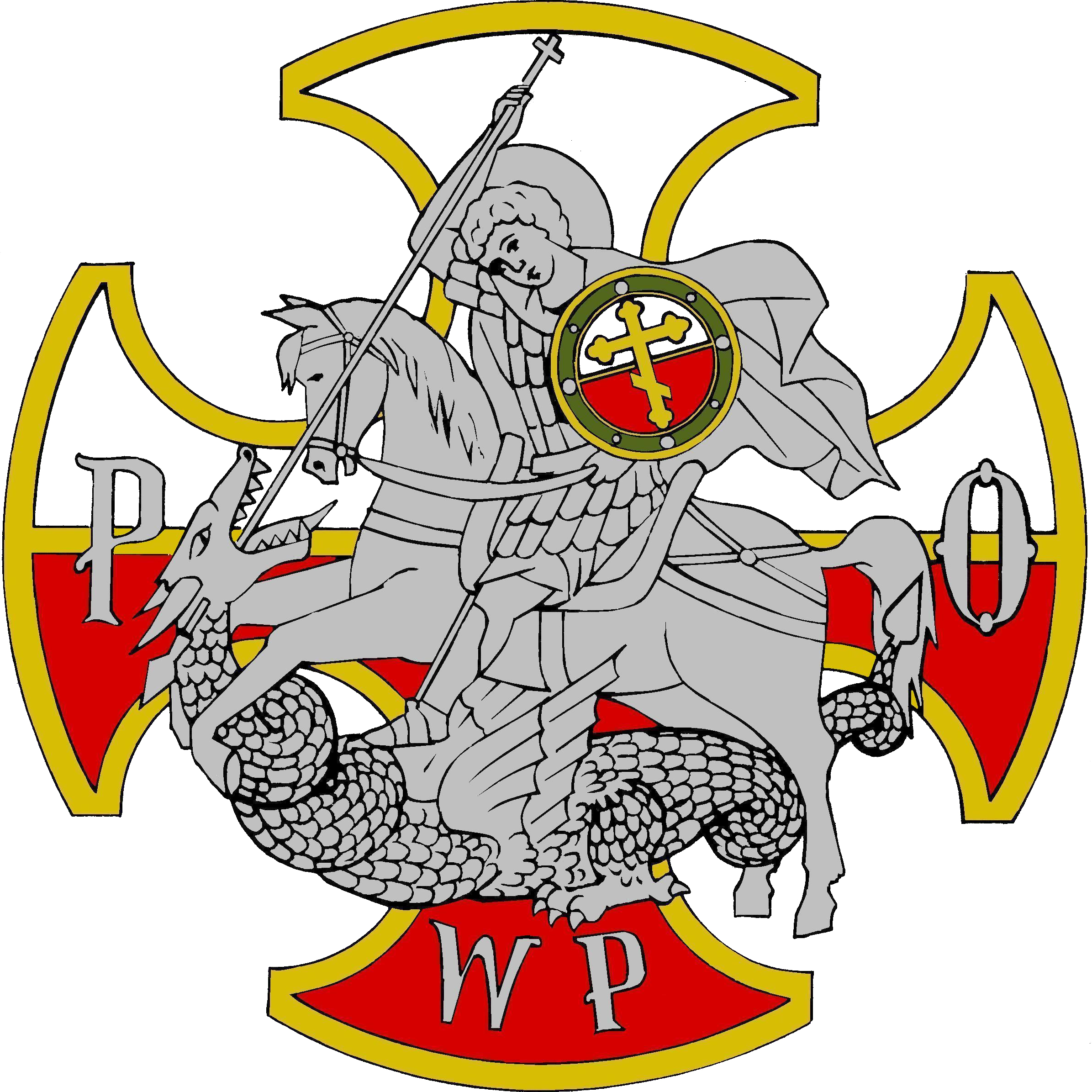 Prawosławny Ordynariat WP – odznaka pamiątkowa – 2012, Polska.